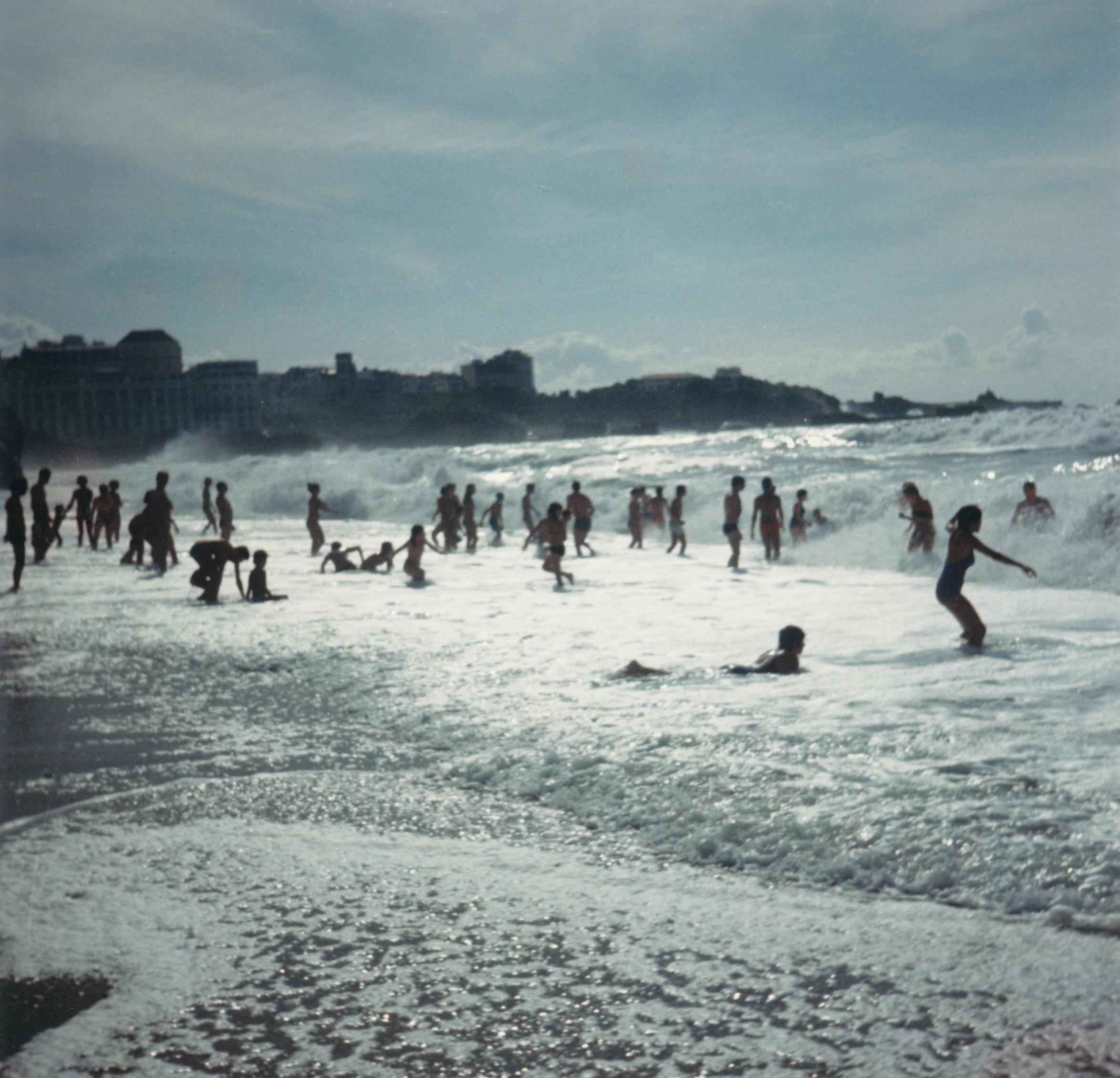 Badefreuden am Grande Plage von Biarritz Datum: 08/1981 Urheber: Michael Pfeiffer Quelle: privates Fotoalbum des Urhebers